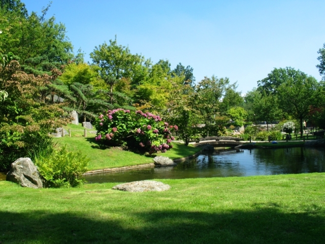 Ik heb een keer in de zomer deze foto gemaakt in de japanse tuin.